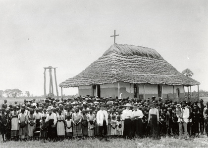 Finnish Misionary Martin Rautanen in Olukonda, South West Africa, 1899 Martin Rautanen med församling framför kyrkan i Olukonda 1899.